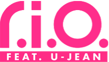 Logo der Band R.I.O.